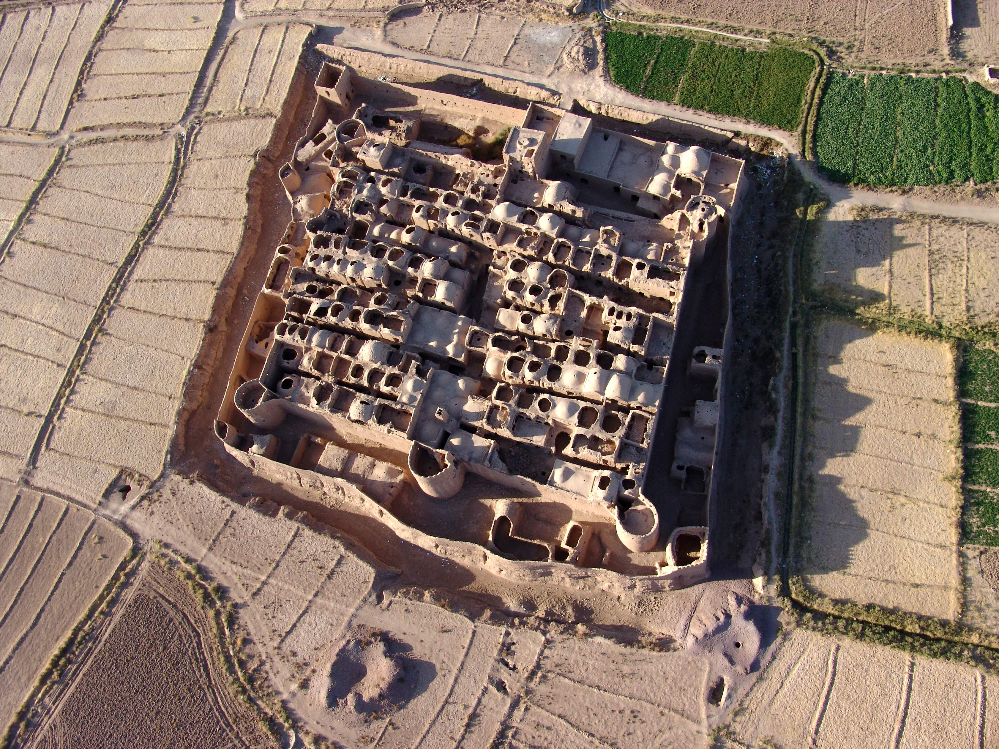 قلعه سر یزد